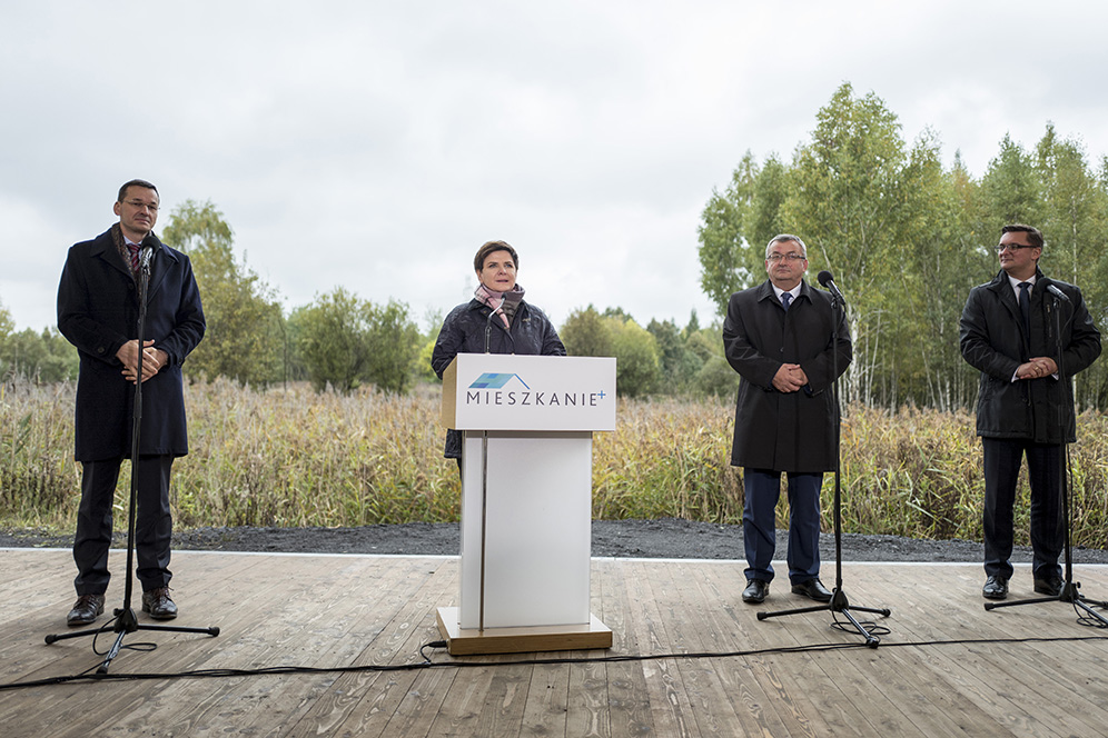 Katowice. Premier Beata Szydło, wicepremier, minister rozwoju i finansów Mateusz Morawiecki oraz minister infrastruktury i budownictwa Andrzej Adamczyk zainaugurowali program Mieszkanie Plus.